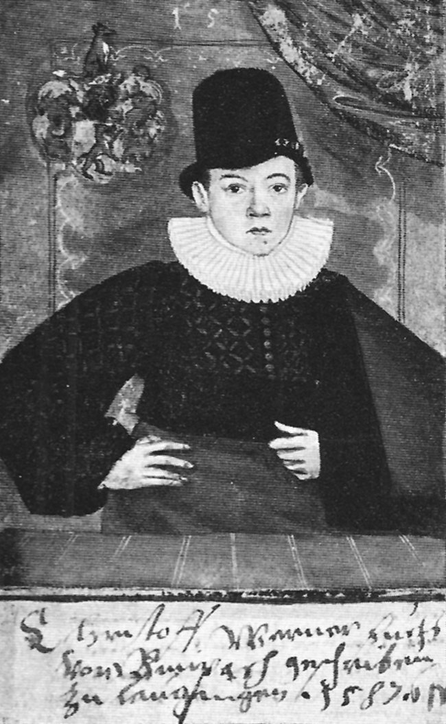 Chr. W. Fuchs von Bimbach (Miniatur aus dem Weihenmayer-Stammbuch)